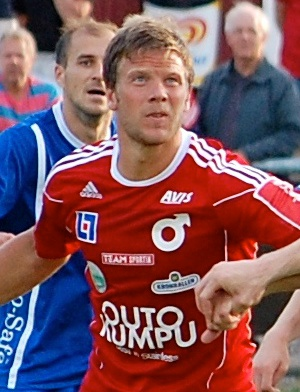 Peter Samuelsson